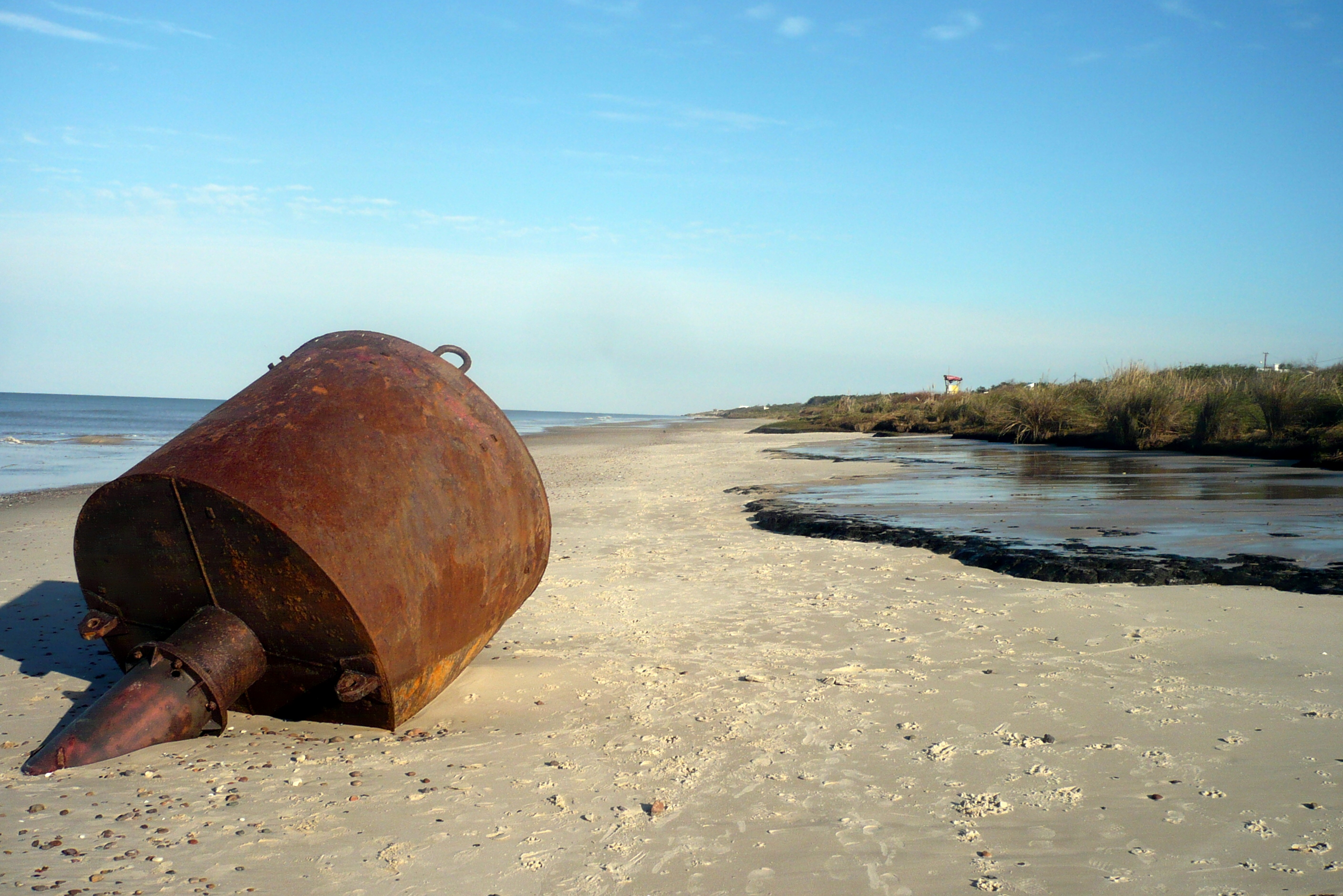 Playa de Santa Ana